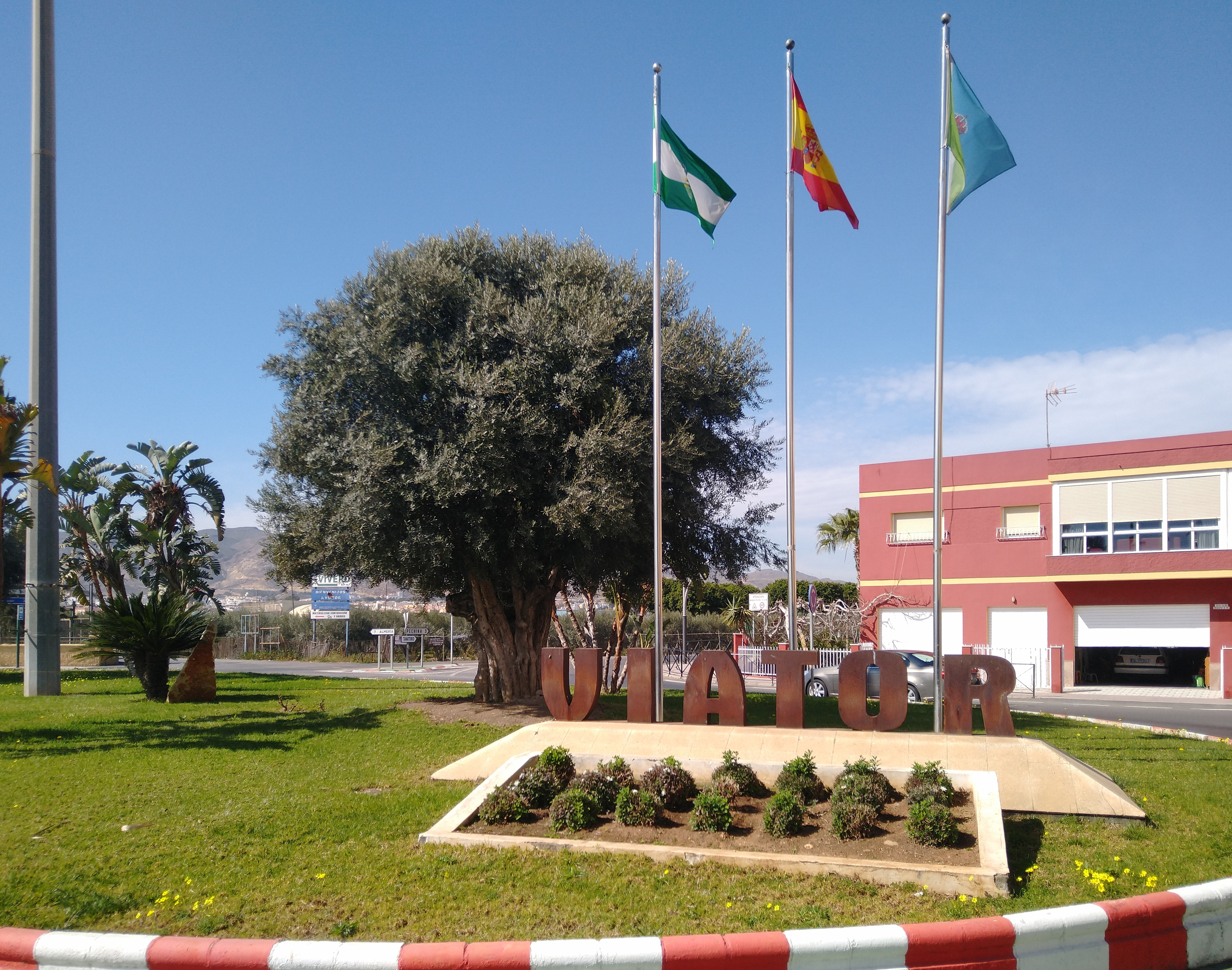 Vista de la localidad de Viator, provincia de Almería (España).